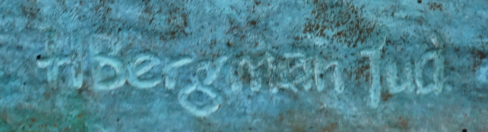 Bergmans konstgjuteri signatur på "Kvinnan i fredsarbetet"